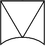 鋤棋的棋盤